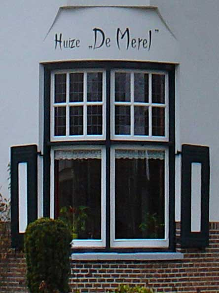 Huize De Merel in Gieten aan de Brink (detail)